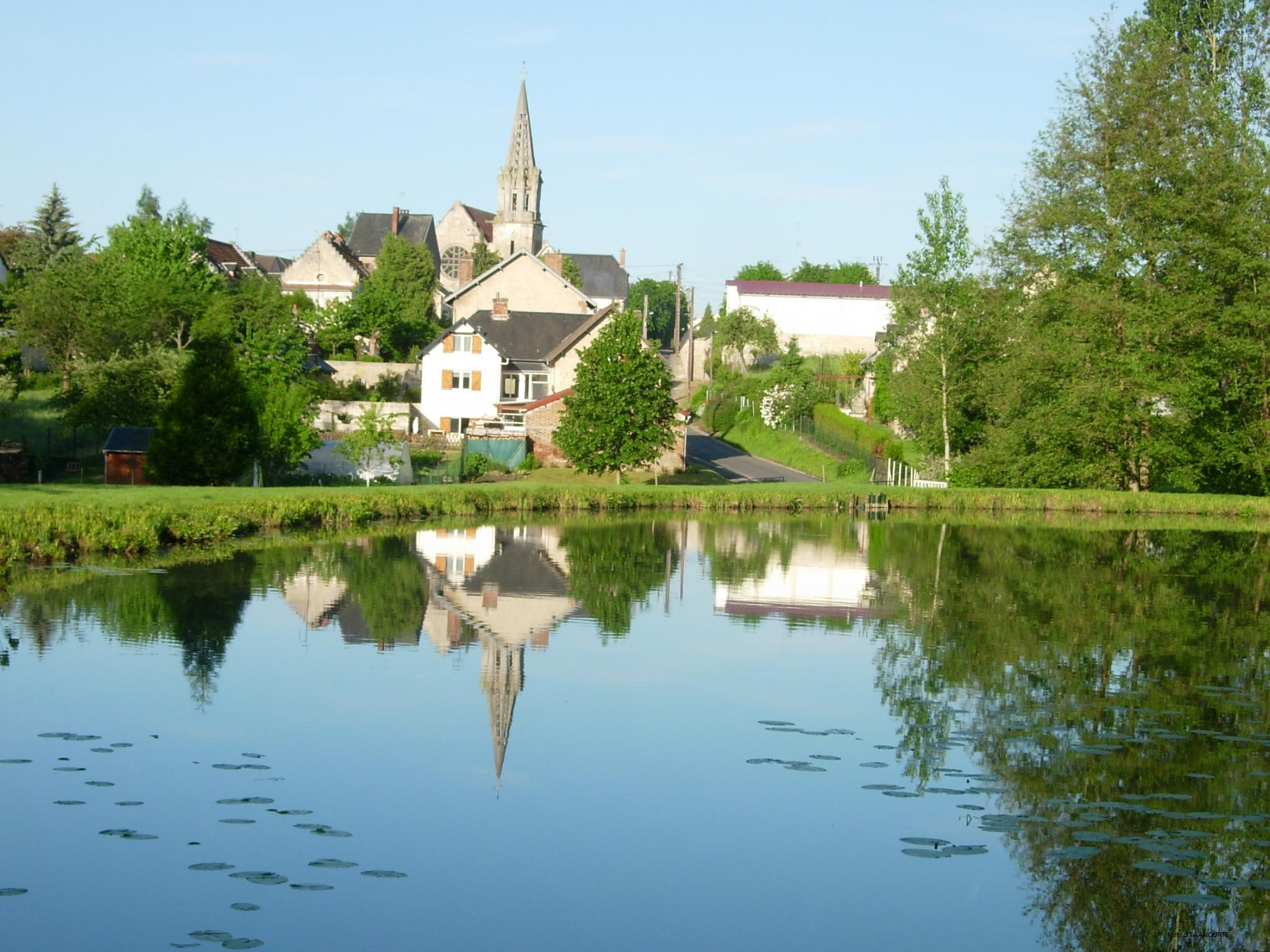 vue de Brancourt en laonnois( l'église,la route de l'étang) prise du chemin de Frival, le long de l'étang communnal.